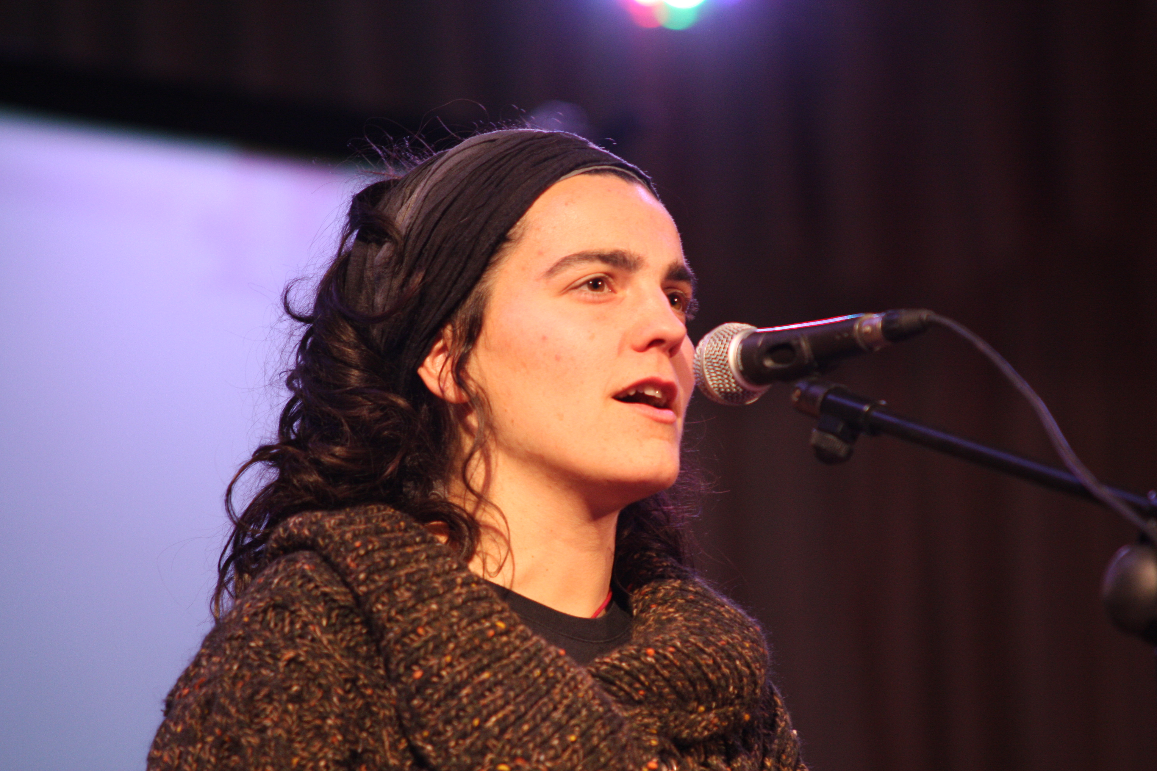 Maialen Lujanbio betsolaria 2008an